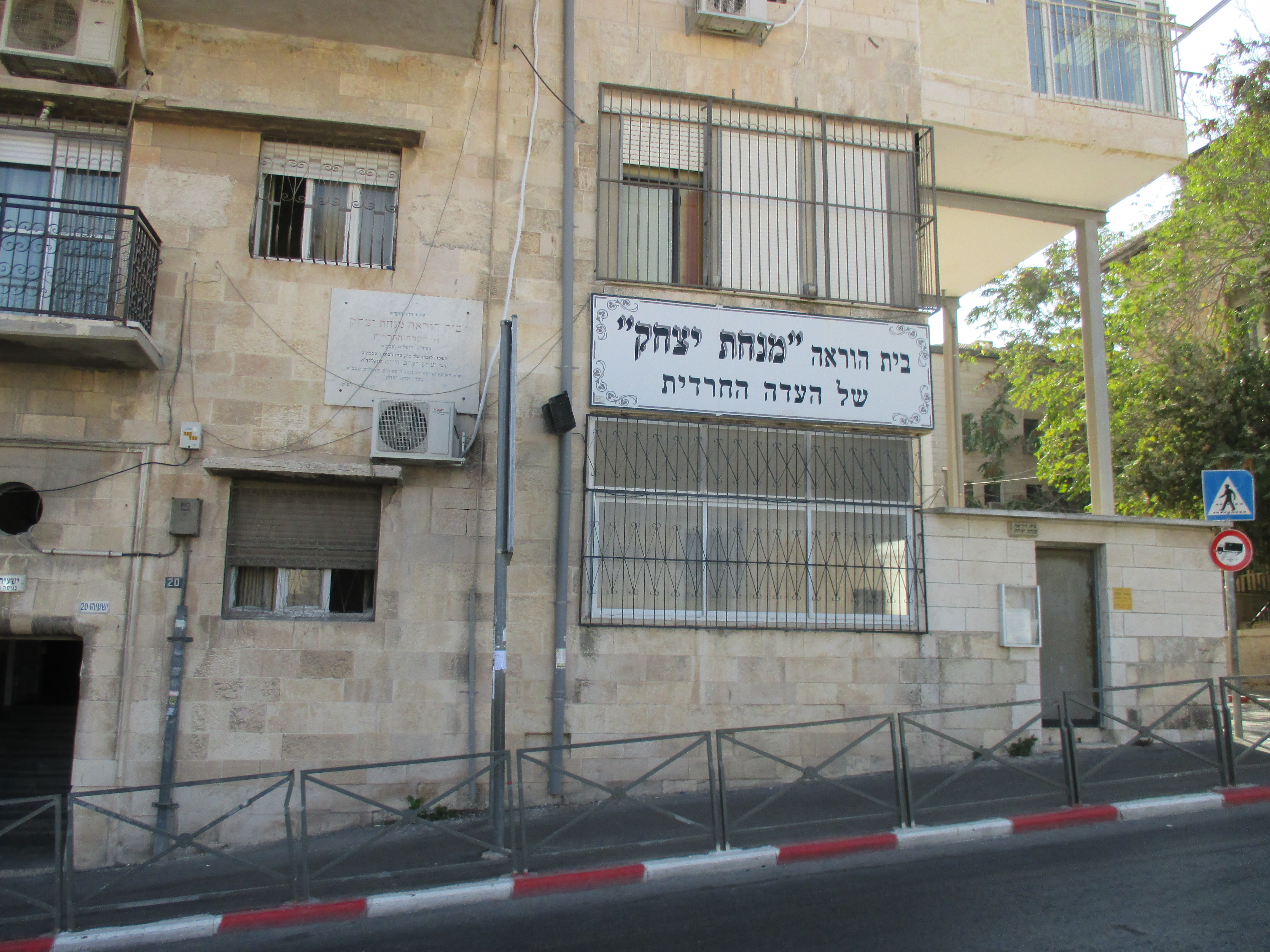 בית הוראה של העדה החרדית ברחוב ישעיהו בירושלים